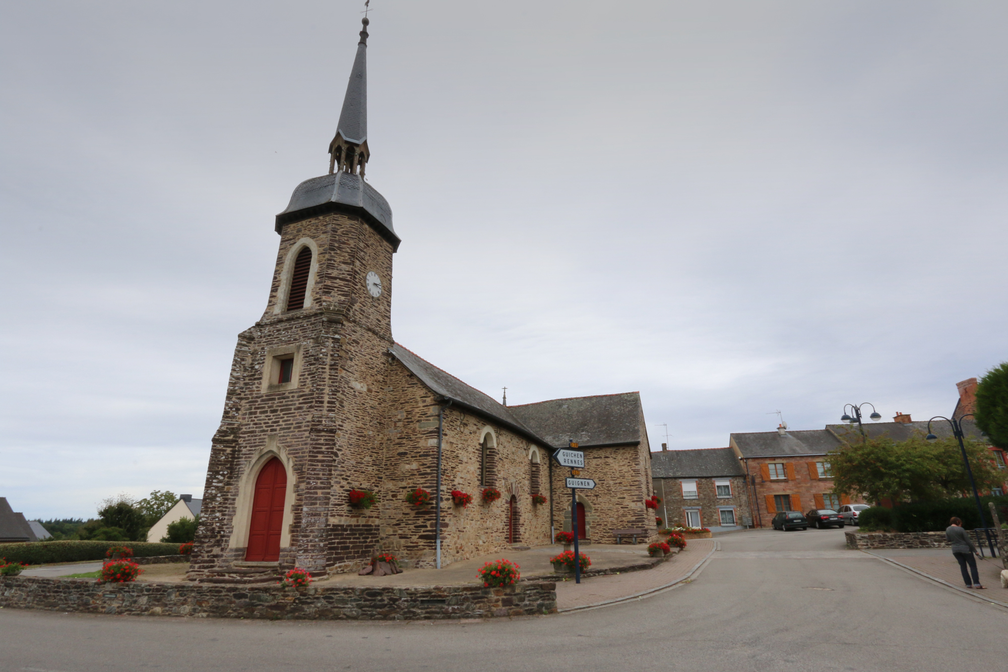 Eglise Saint-Martin de Lassy